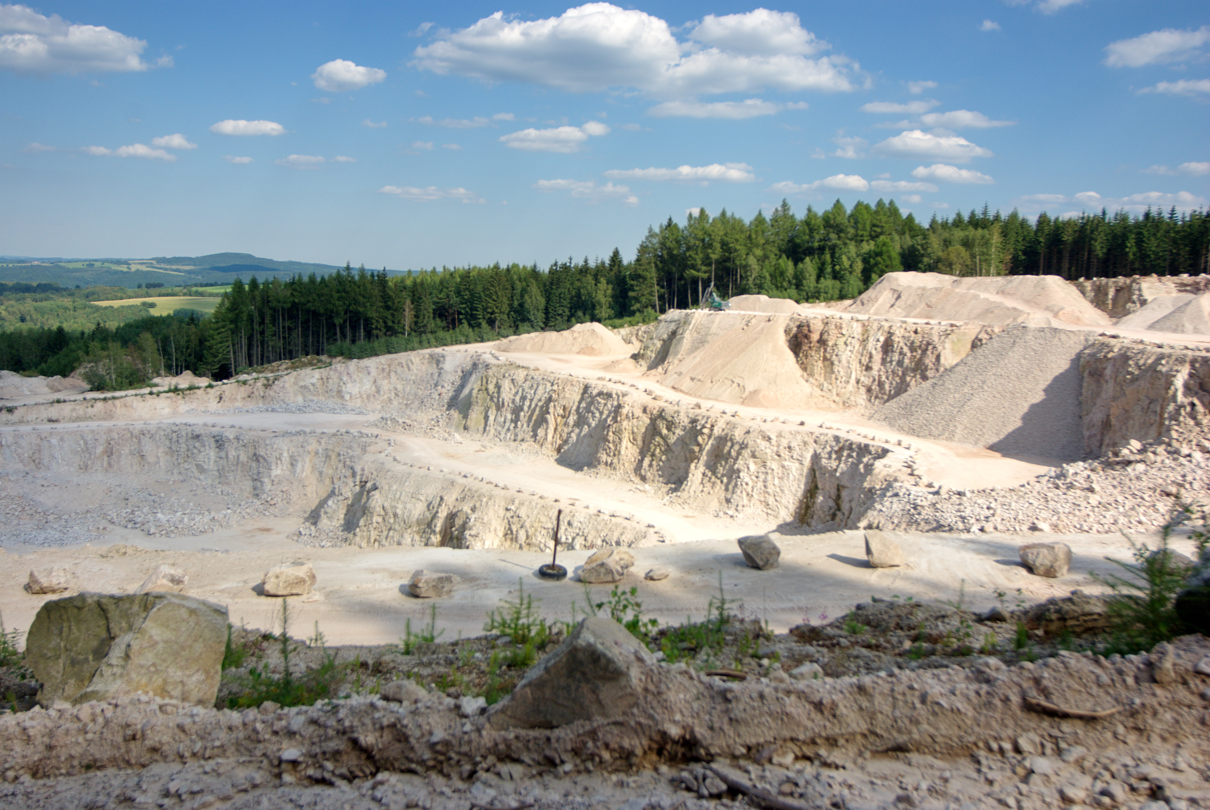 Krásno, povrchové dobývky Vysoký kámen - živcový lom